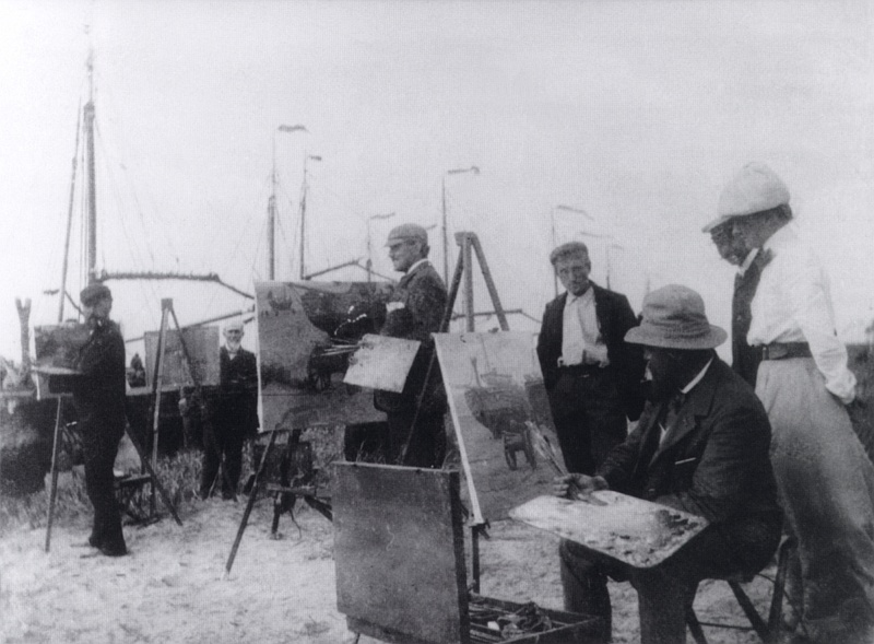 Kunstenaars aan het Katwijkse strand (links Derk Wiggers, in het midden Willy Sluiter en zittend rechts Hendrik Willebrord Jansen